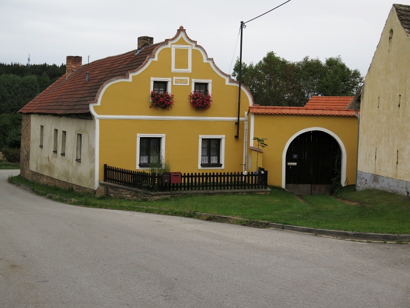 Usedlost čp. 24, Žernovice 24, Žernovice.